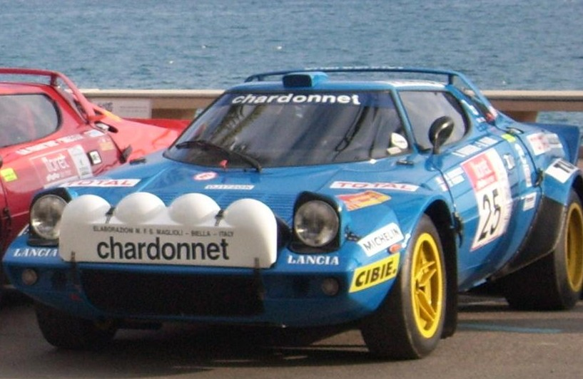 Lancia Stratos Chardonnet à Lloret de Mar, Costa Brava, Espagne, en 2008 (Rallye de Catalogne WRC). Détail de l'image libre de droits 2008-11-09 15:08 Sonett72 2269×1015× (264606 bytes) Description 4x Lancia Stratos at the Rally Costa Brava, Lloret de Mar, Spain, 2008-11-08Date 9 November 2008Source I created this work entirely by myself.Author Skblzz1 (talk) 4x Lancia Stratos at the Rally Costa Brava, Lloret de Mar, Spain, 2008-11-08